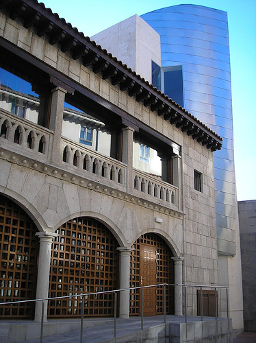 Lateral de la Casa Museo tras la restauración.